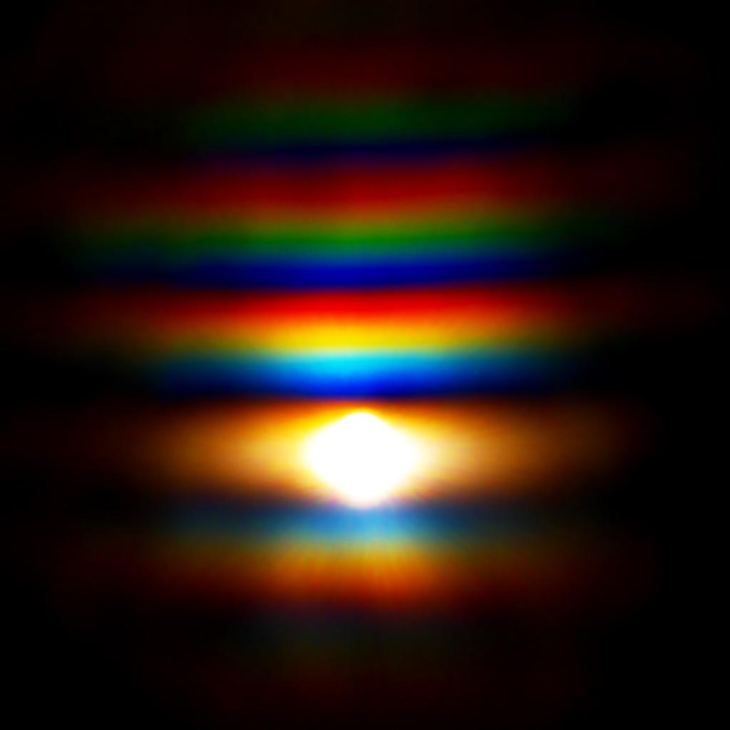 Queteletsche Ringe auf einem mit Talkumpuder bestäubten Spiegel